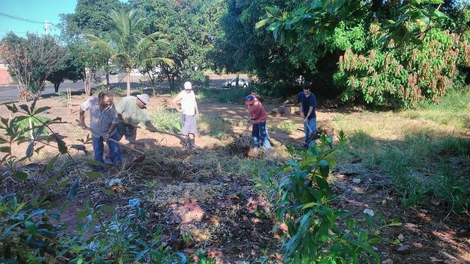 Moradores do Chico Piscina uniram forças para ajudar na limpeza do Parque, na Rua Guatemala.